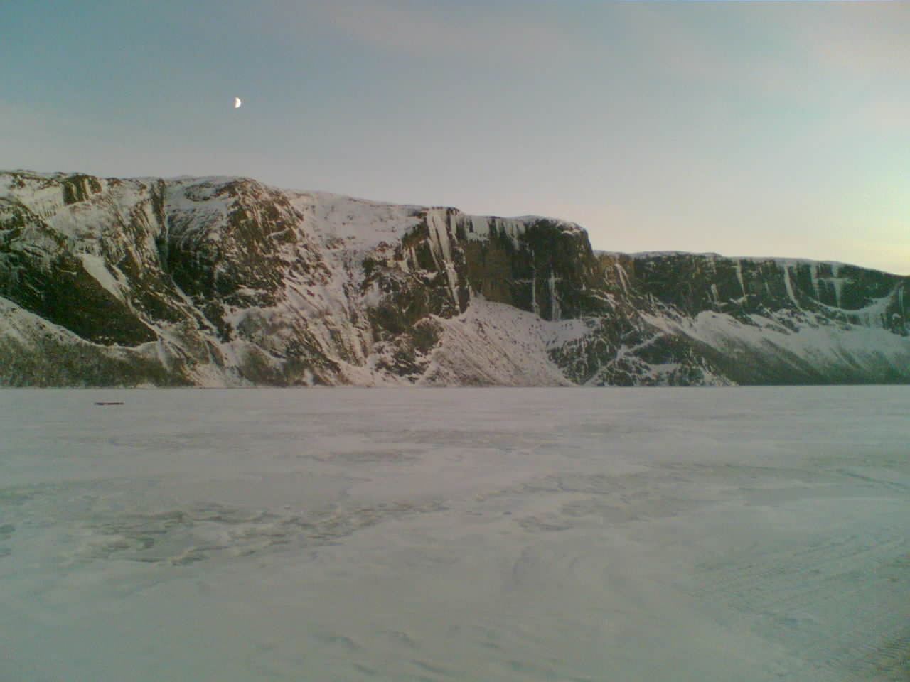 Seglfjellet i Beiarn i Nordland, 650 m.o.h., sett fra sørvest, vinter, is på fjorden